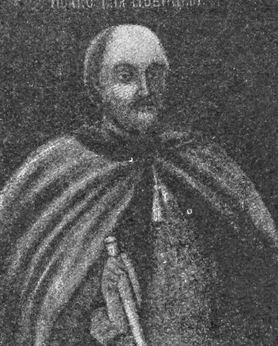 Полковник Илья Фёдорович Новицкий. Это изображение было использовано для иллюстрирования статьи «Киевский, 9-й гусарский, полк» опубликованной в двенадцатом томе «Военной энциклопедии», который был издан книгоиздательским товариществом И. Д. Сытина в 1913 году в столице Российской империи городе Санкт-Петербурге. Более подробное описание к этой картинке можно прочесть в указанной выше статье.